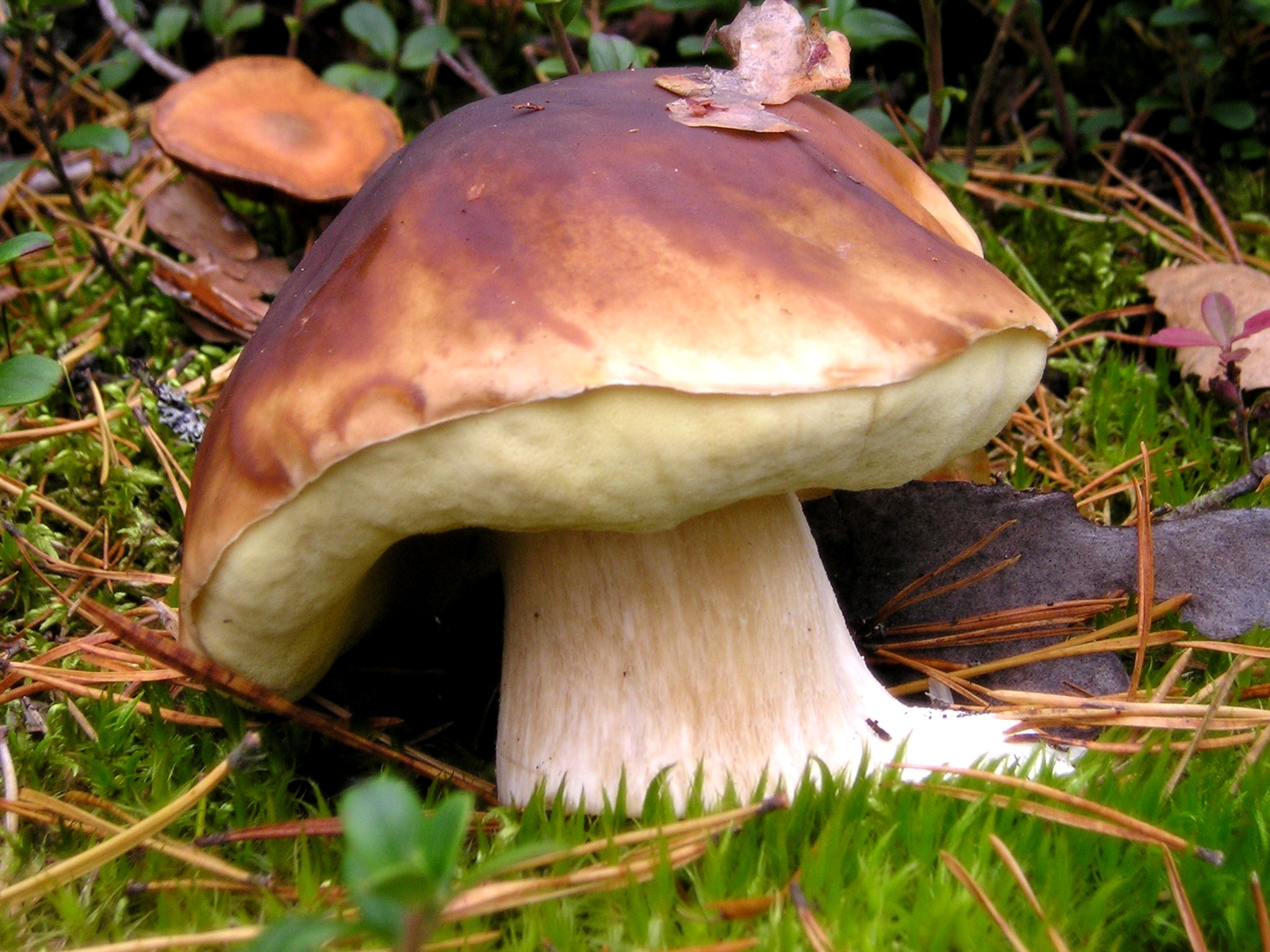 Гриб боровик